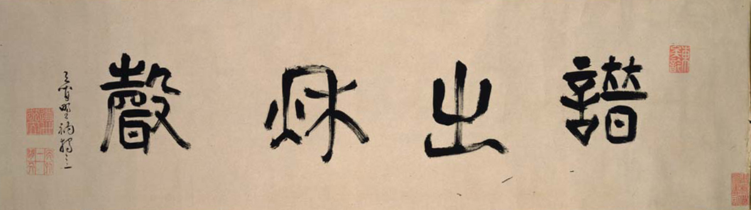 讃出秋声巻 独立性易